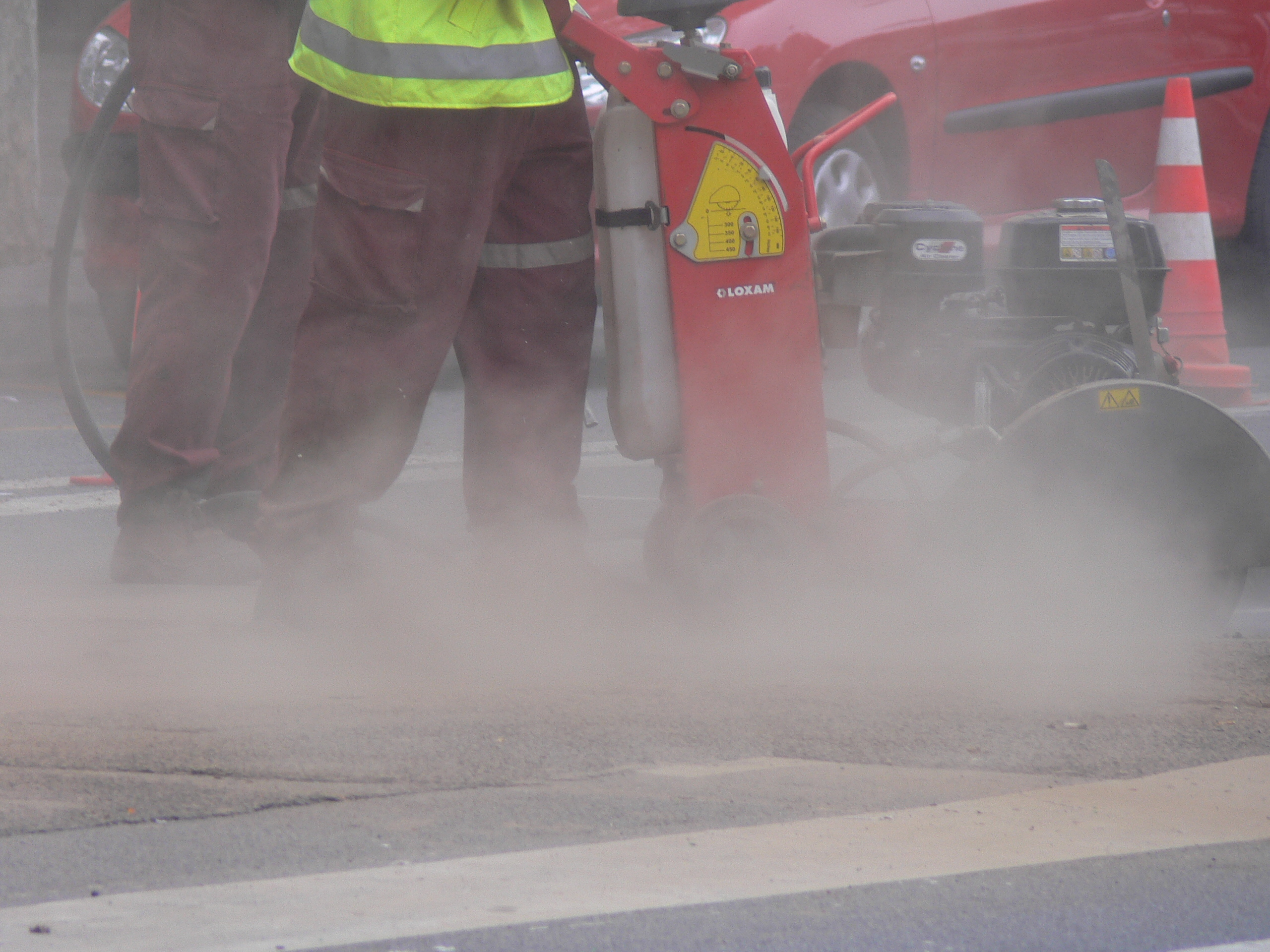 poussière émise par la découpe de béton avec une meuleuse lors de travaux dans une grande ville. Selon les pays il est recommandé ou obligatoire de porter un masque FFP2 ou FFP3 pour se protéger les poumons. Ici l'utilisation d'air comprimé pour nettoyer le chantier expulse la poussière (source de pollution de l'air). Il aurait été possible d'aspirer la poussière ou de mouiller le trait de coupe..